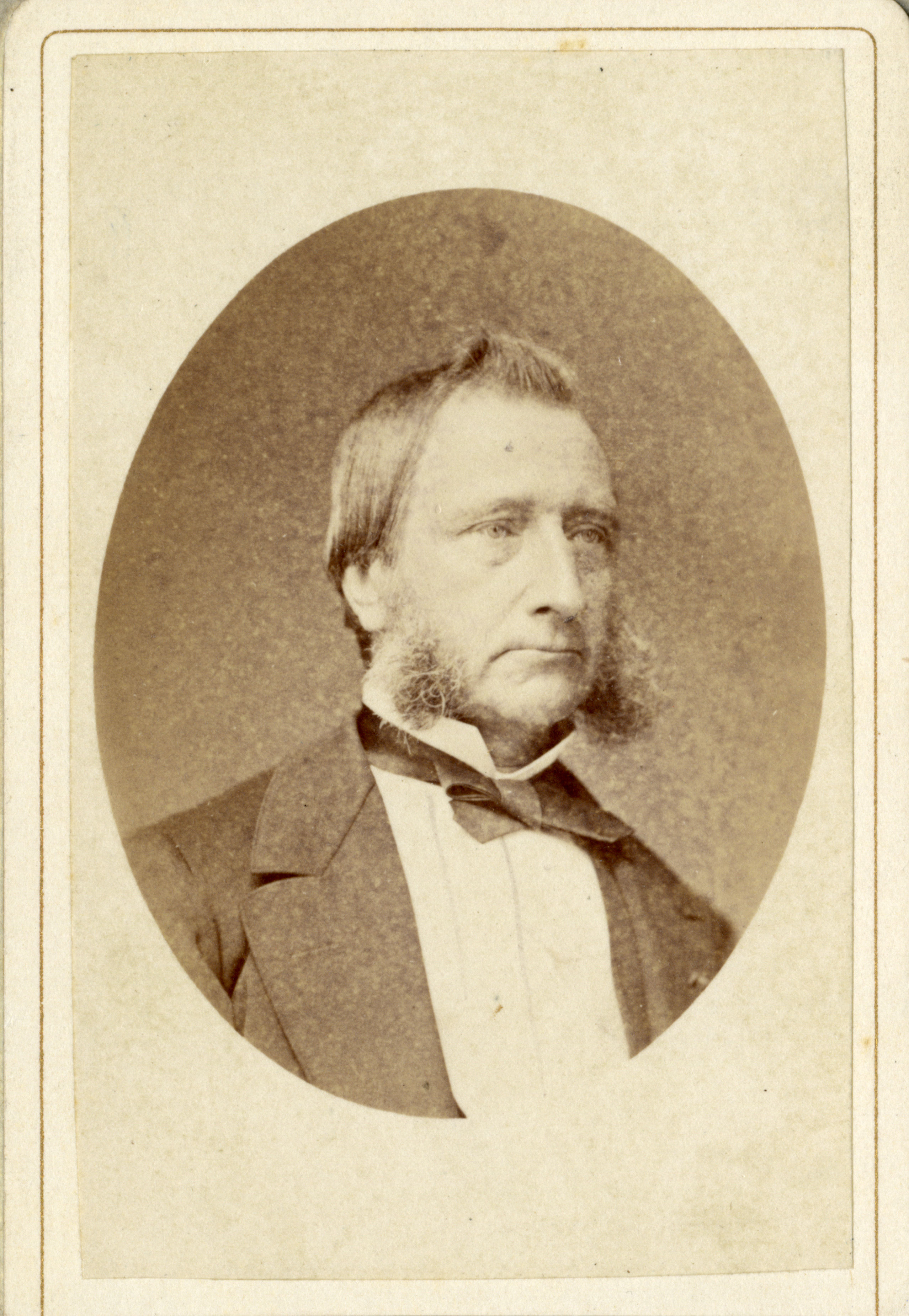 Portret van W.R. Boer, geboren 1818, burgemeester van Utrecht (1878-1891), overleden 1894. Borstbeeld rechts, in ovaal.